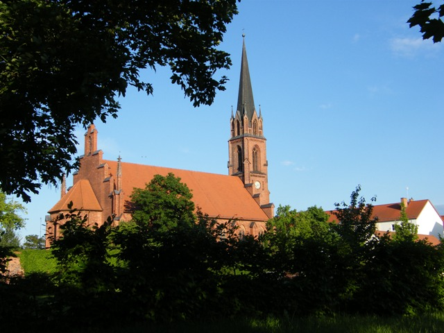 Klosterkirche Emil Flaminius (1807–1893) Alternative names Emil Karl Alexander FlaminiusDescriptionGerman architectDate of birth/death 1807 7 October 1893Location of birth/death Kostrzyn nad Odrą BerlinWork location Frankfurt (Oder); BerlinAuthority control : Q109349 creator QS:P170,Q109349